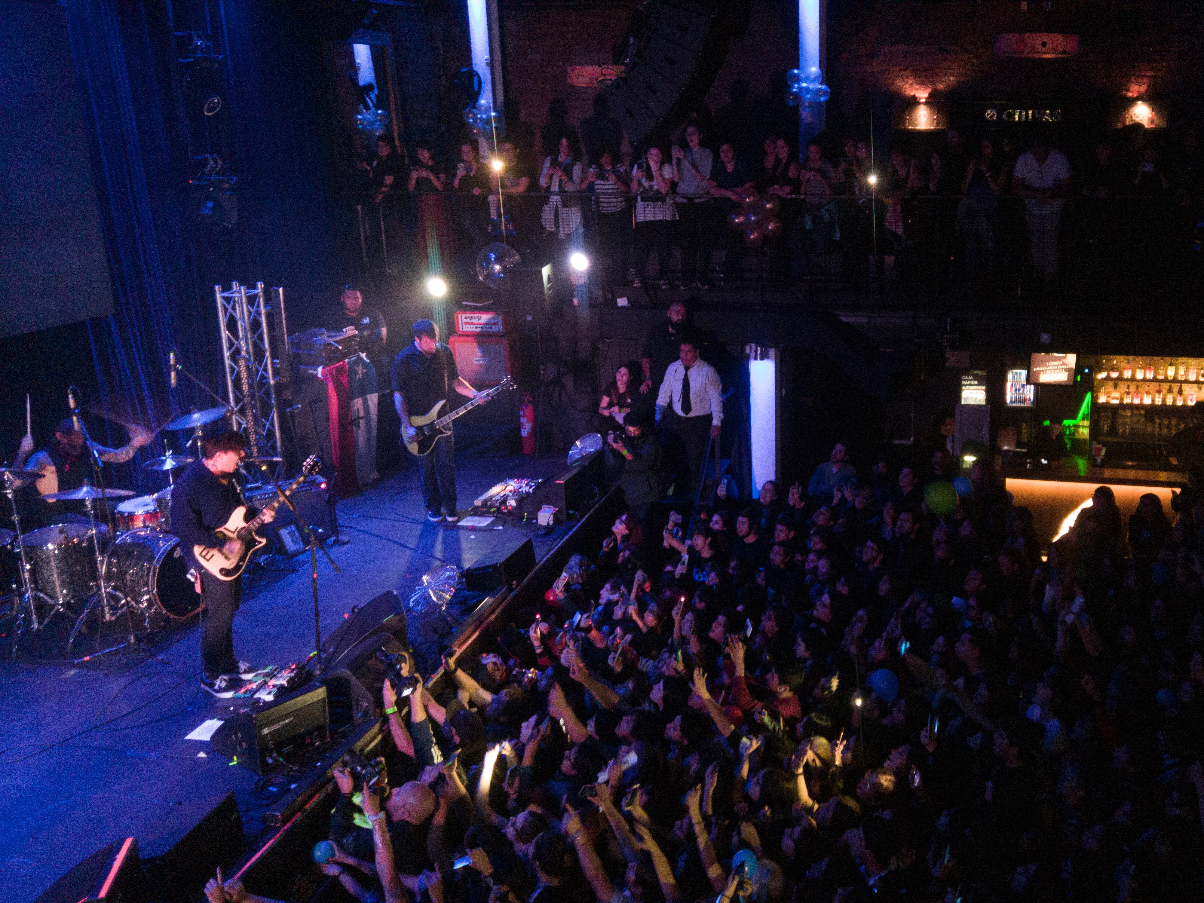 Frank Iero and the Future Violents en su concierto en Santiago de Chile, en el Club Chocolate.